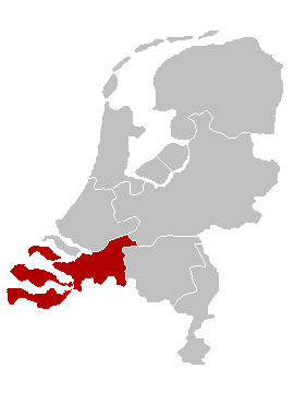 Locatie Bisdom Breda, eigen werk